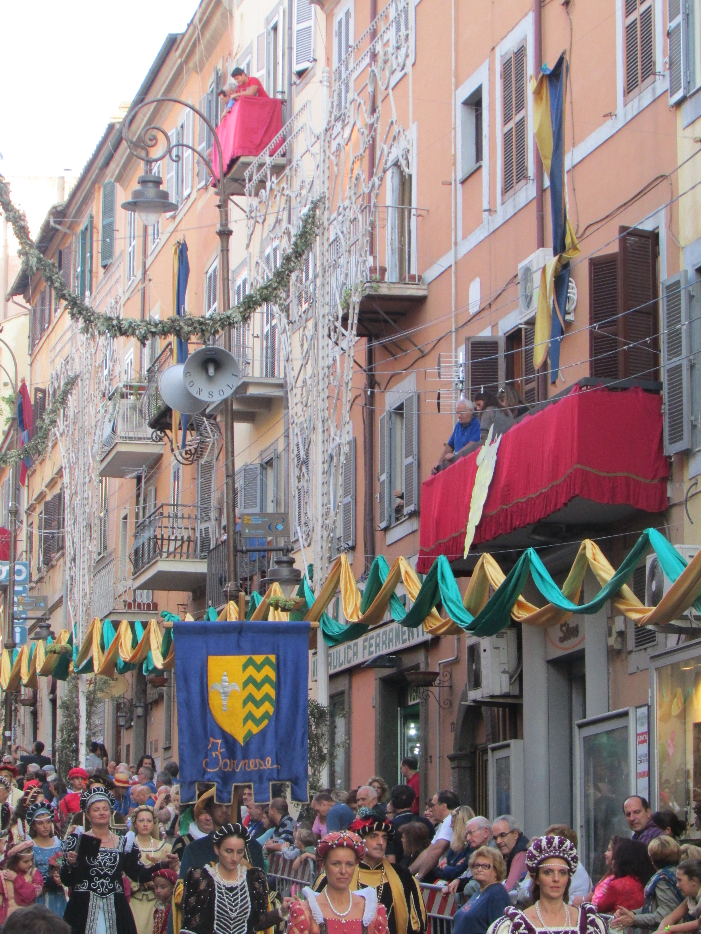 Particolare di corso Trieste durante il passaggio del corteo storico